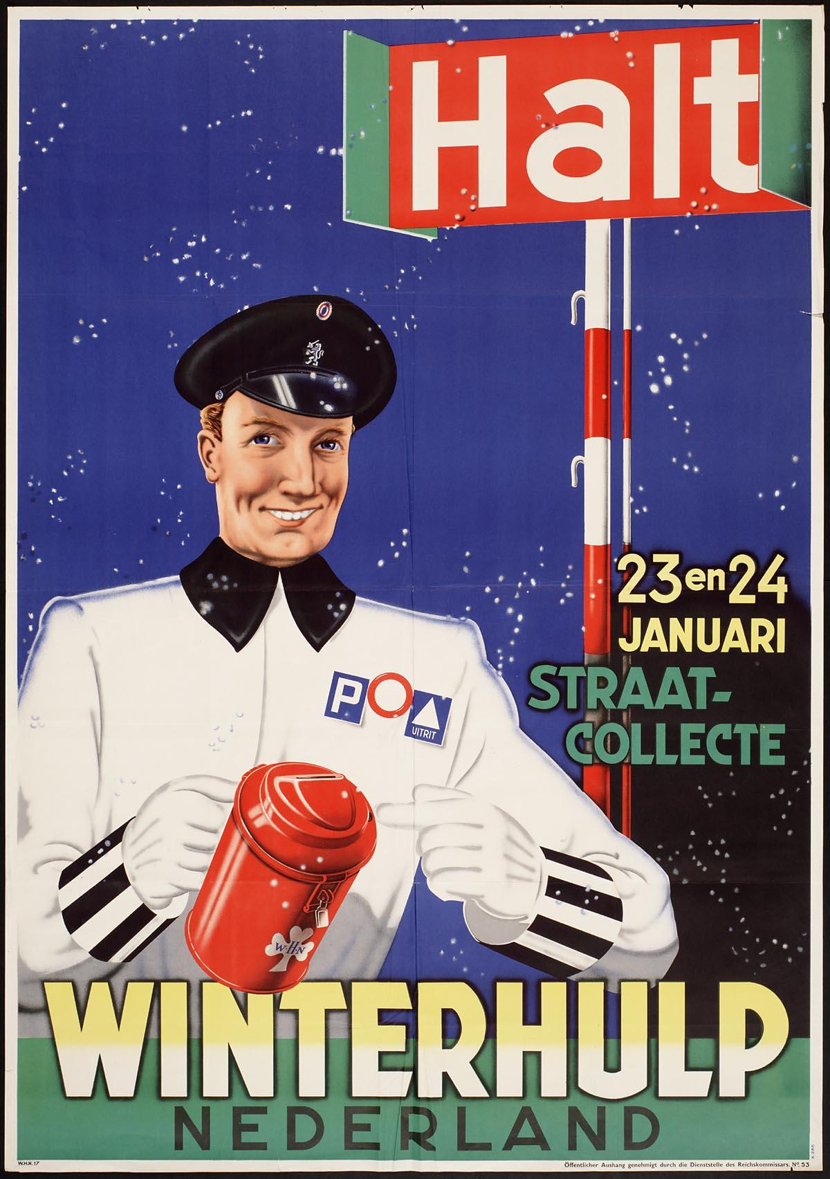 Affiche: "Halt. 23 en 24 januari Straatcollecte. Winterhulp Nederland."